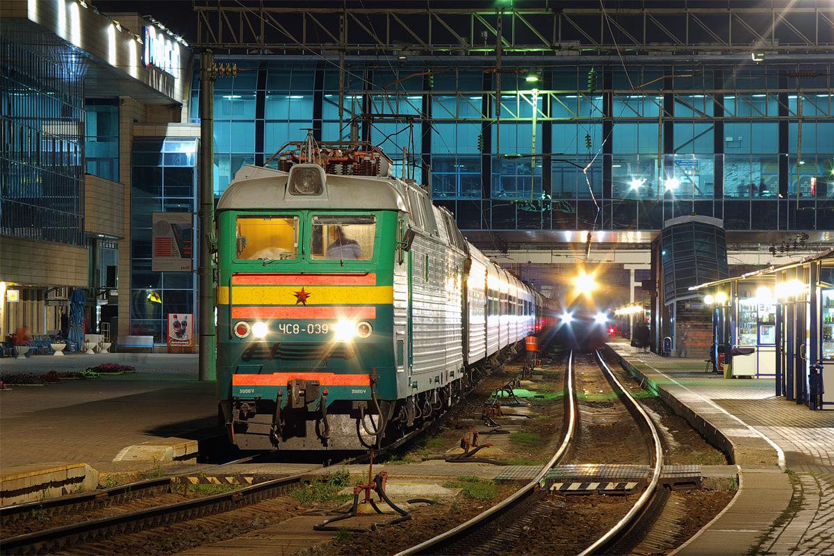 Станция Ростов-Главный